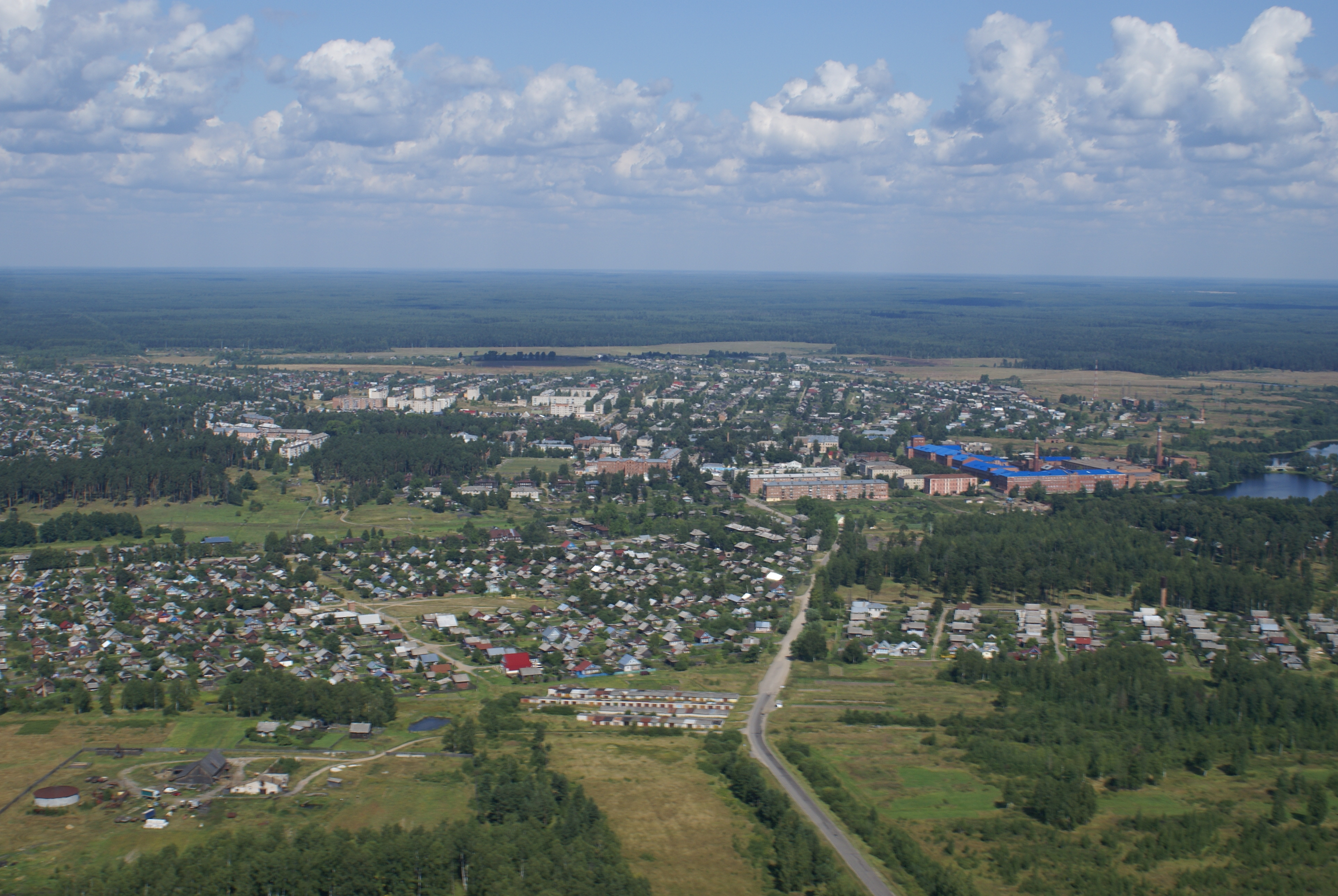 Вид на Южу